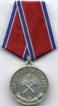 Медаль «За отвагу на пожаре»